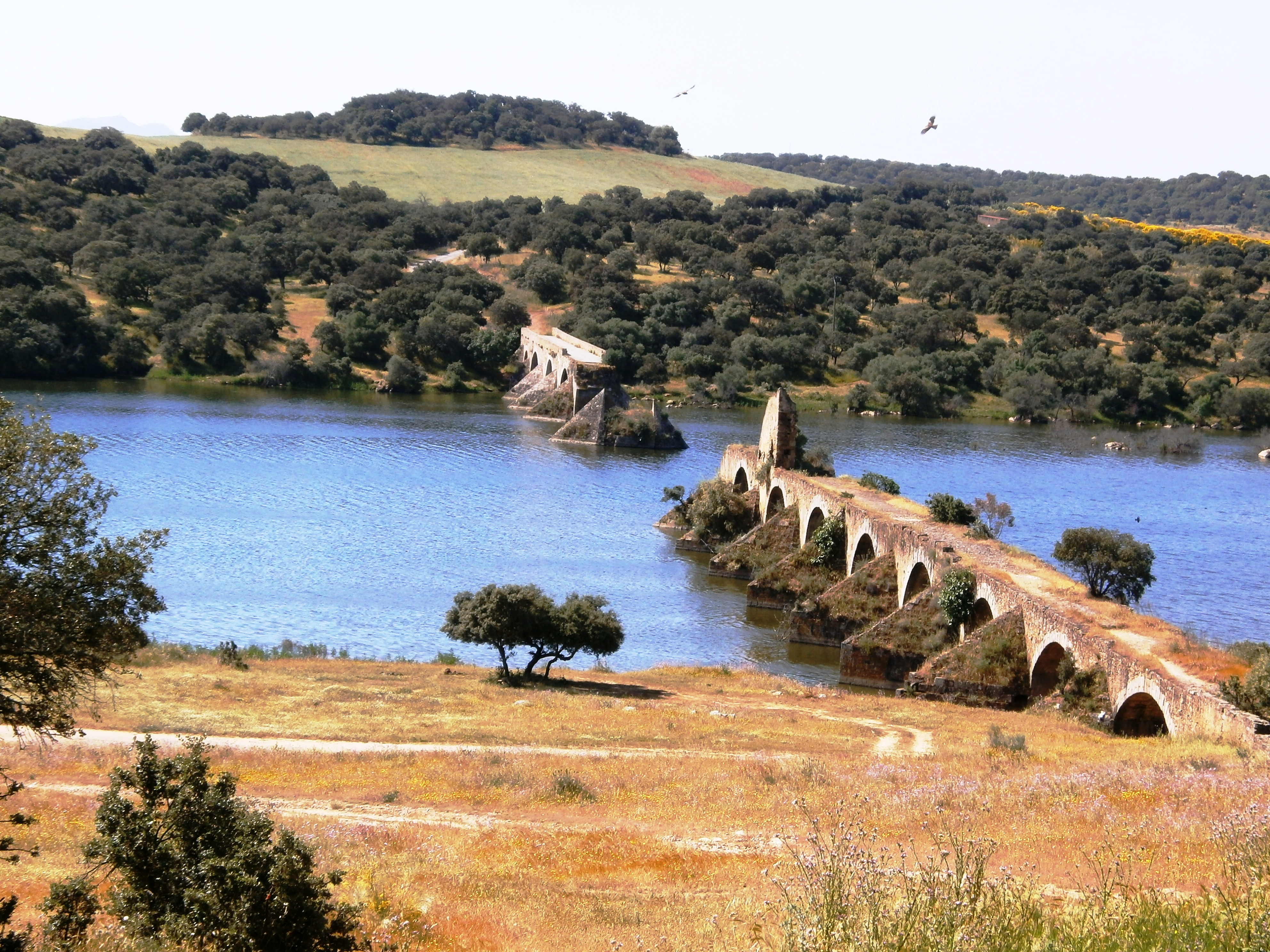 Río Guadiana Internacional This is a photography of a Site of Community Importance in Spain with the ID: ES4310027. Natura2000 entry, EEA entry